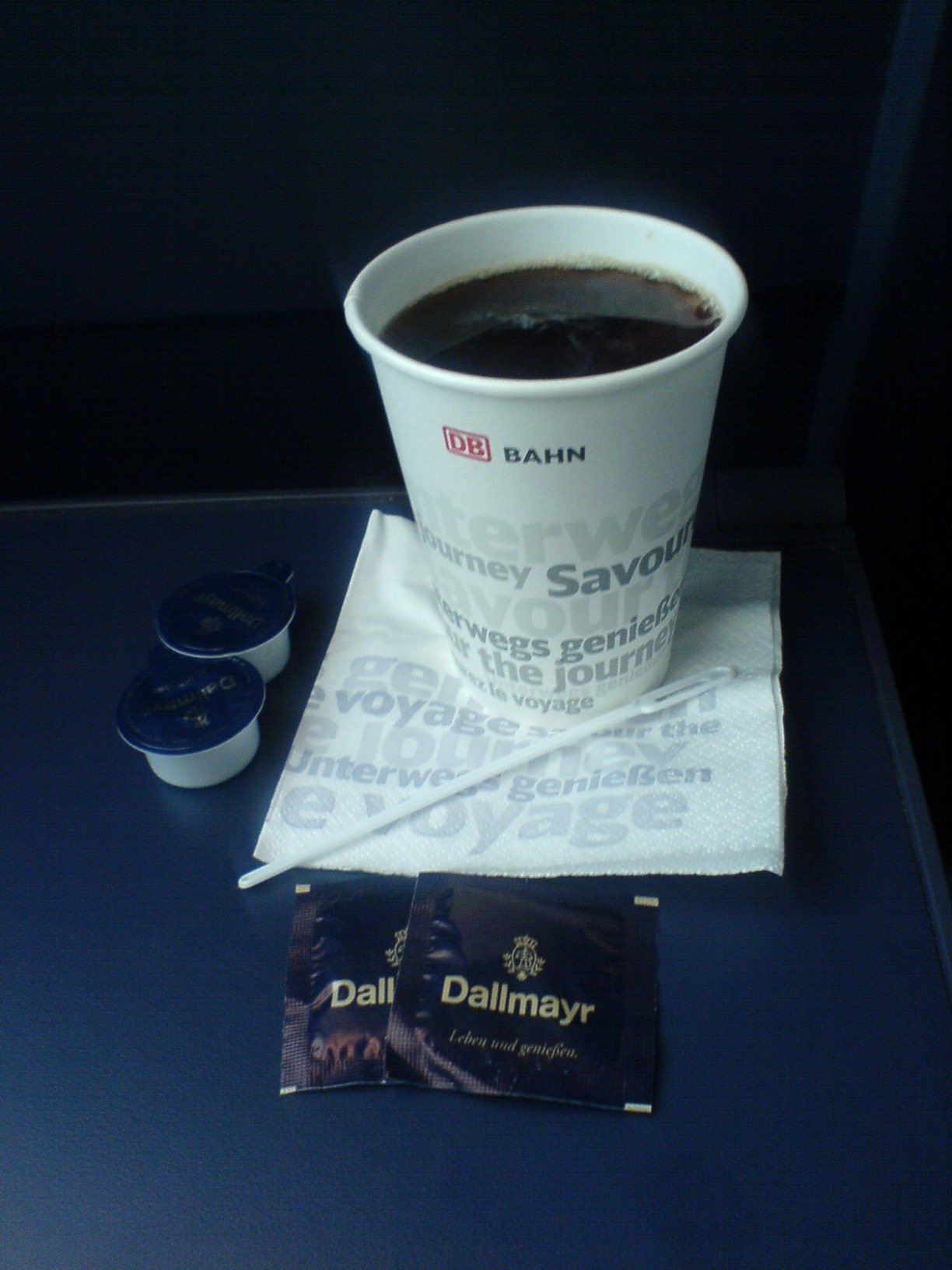 ICE 782 - DB-Kaffeebecher am Platz.